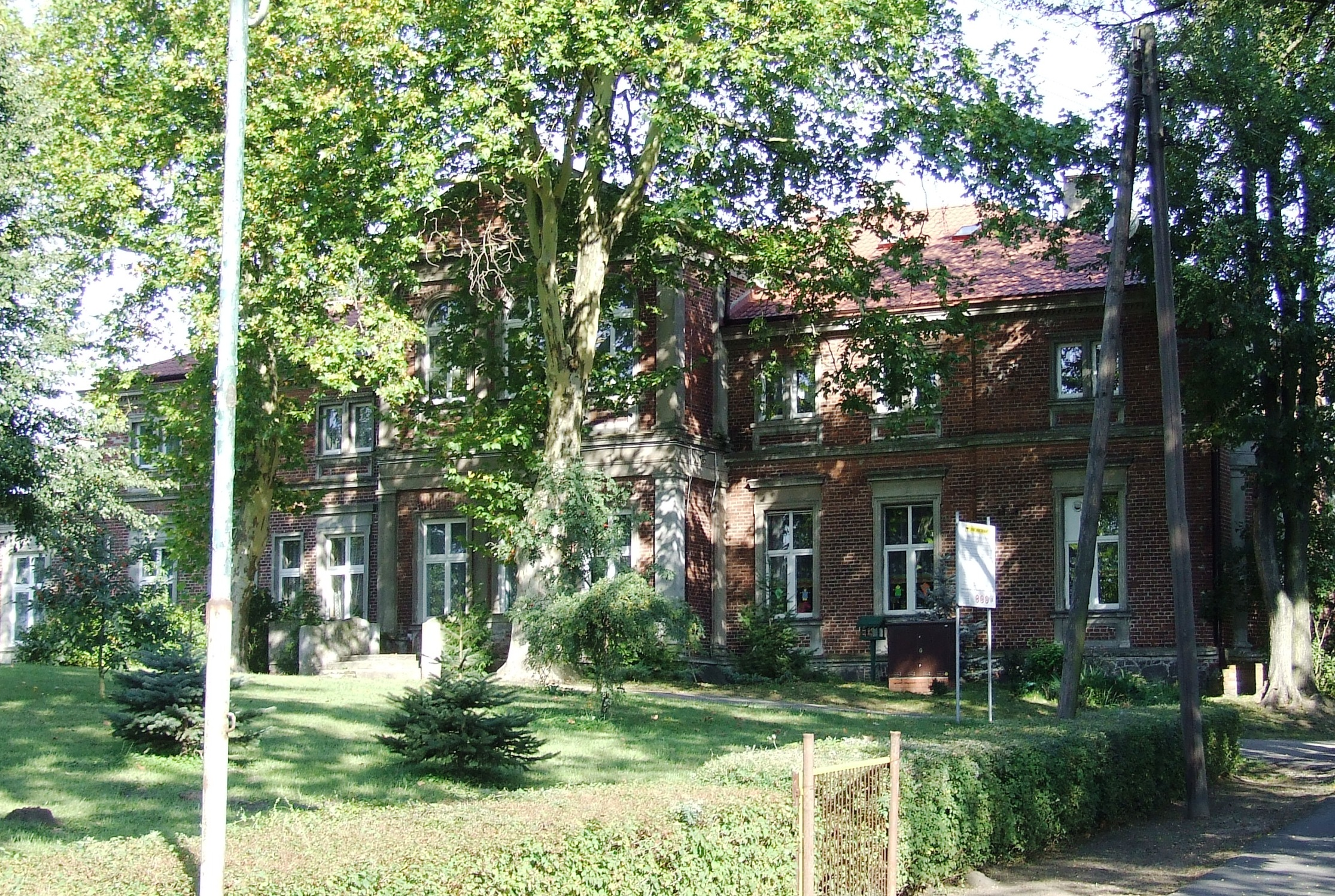 Zdziechowa - zespół dworski z 1870 r.: dwór (zabytek nr 2130/A)